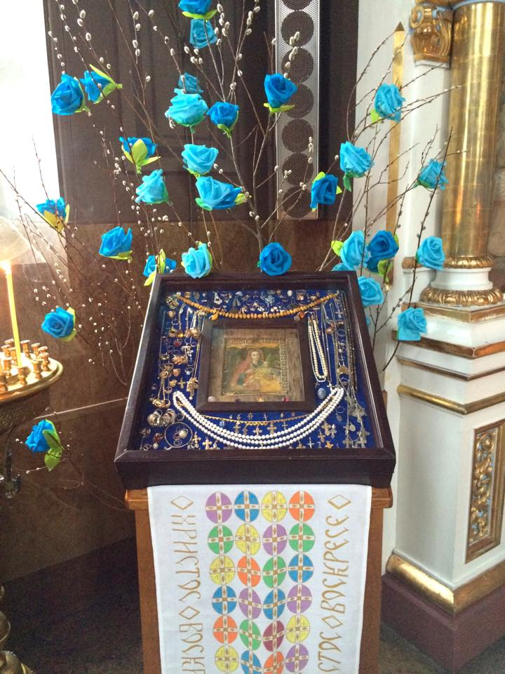 Чтимый список Козельщанской иконы Божией Матери в Успенском соборе Хельсинки